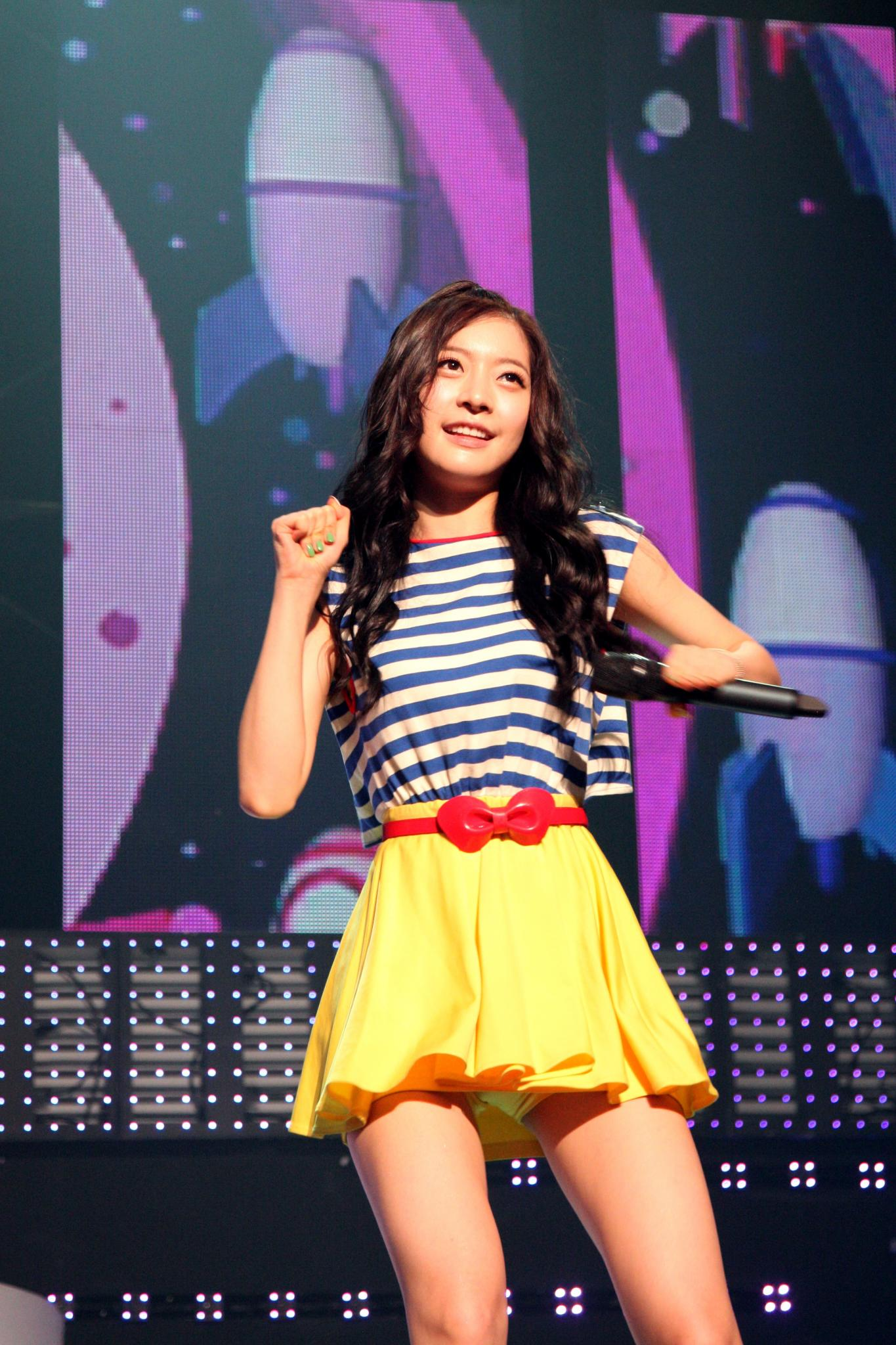 달샤벳 @ Cyworld Dream Music Festival 싸이월드 드림 뮤직 페스티벌_10